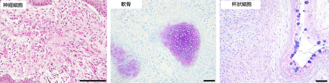 自iPS細胞中分化出的、分別來自外胚層、中胚層、內胚層的細胞/組織。